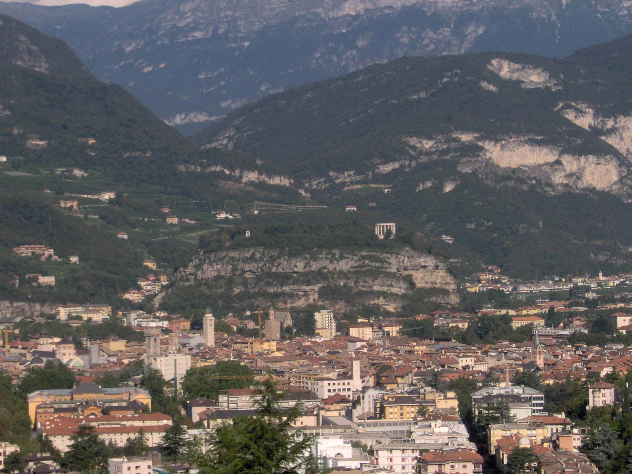 Panorama della città di Trento e del Doss Trento